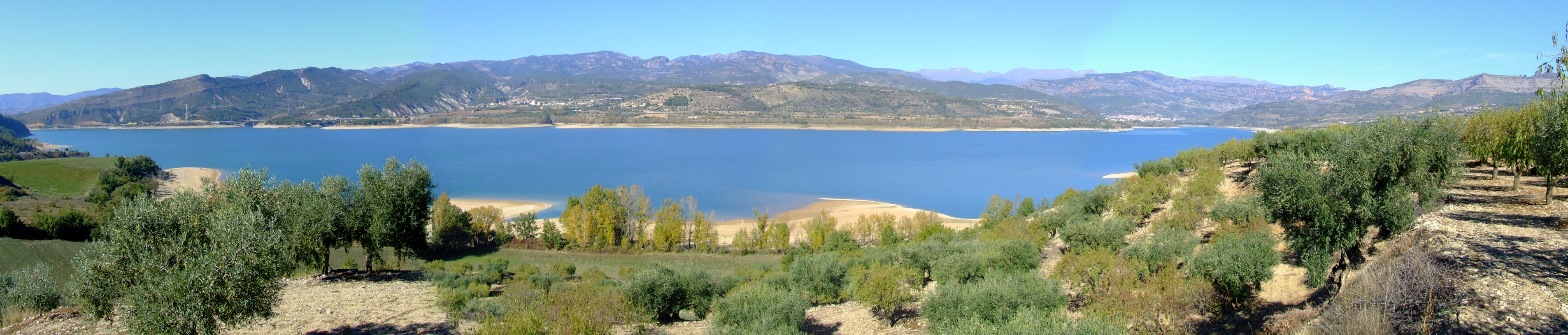 El Pantà de Sant Antoni des de Puig de l'Anell (Pallars Jussà)